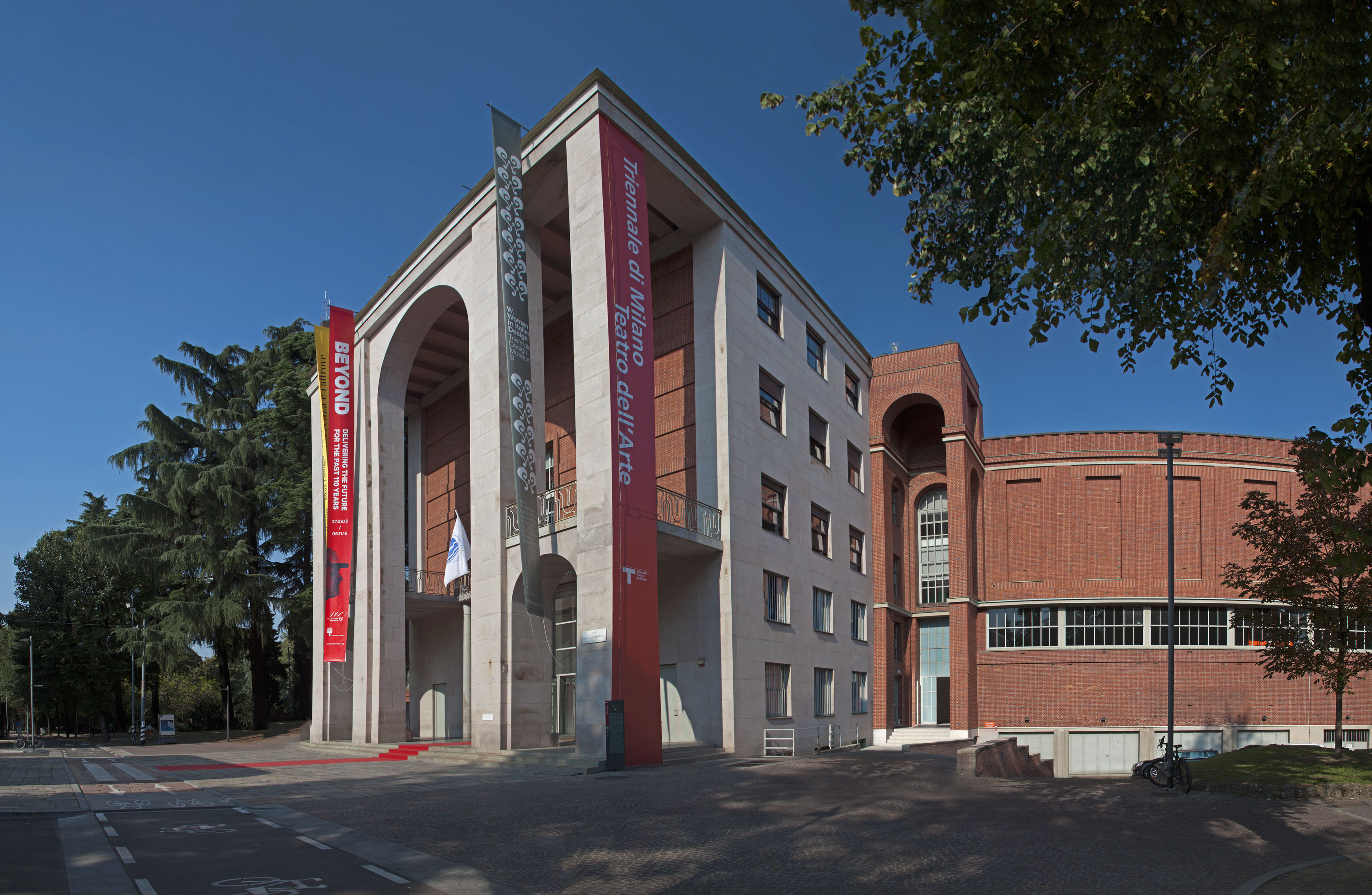 Palazzo dell'Arte entrata This is a photo of a monument which is part of cultural heritage of Italy.